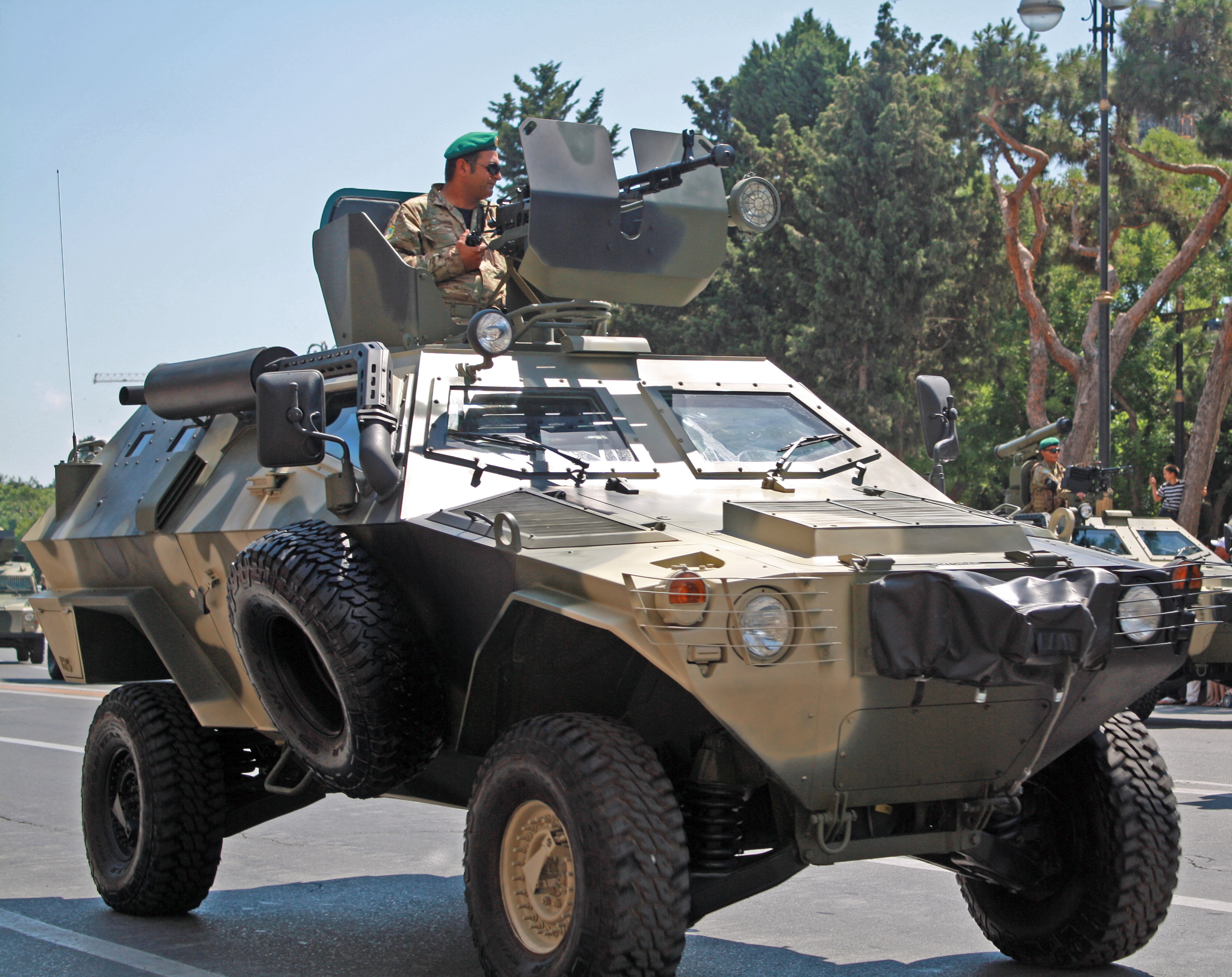 Военный парад, в Баку 26 июня 2011 год.